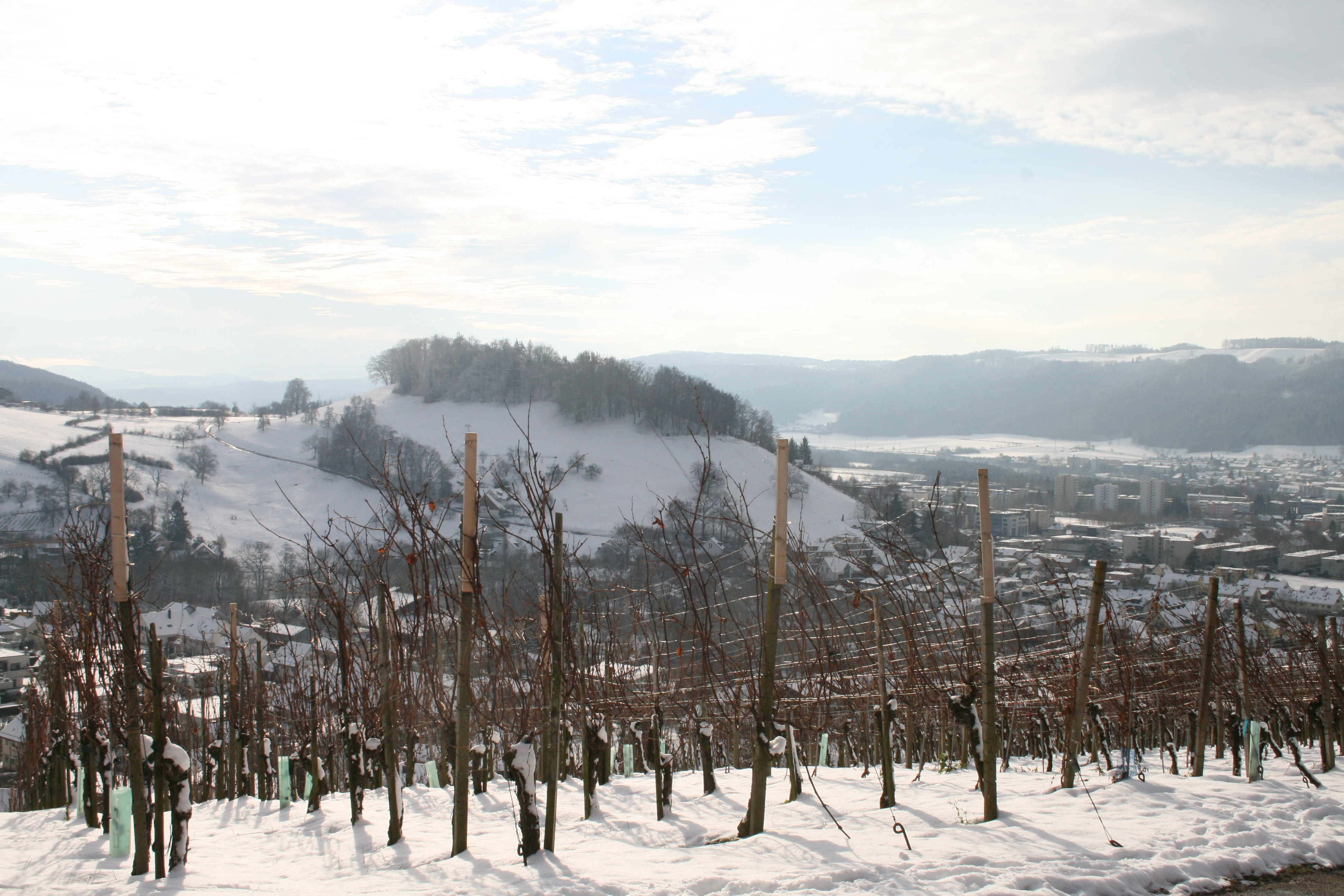 Rebberg in Wettingen